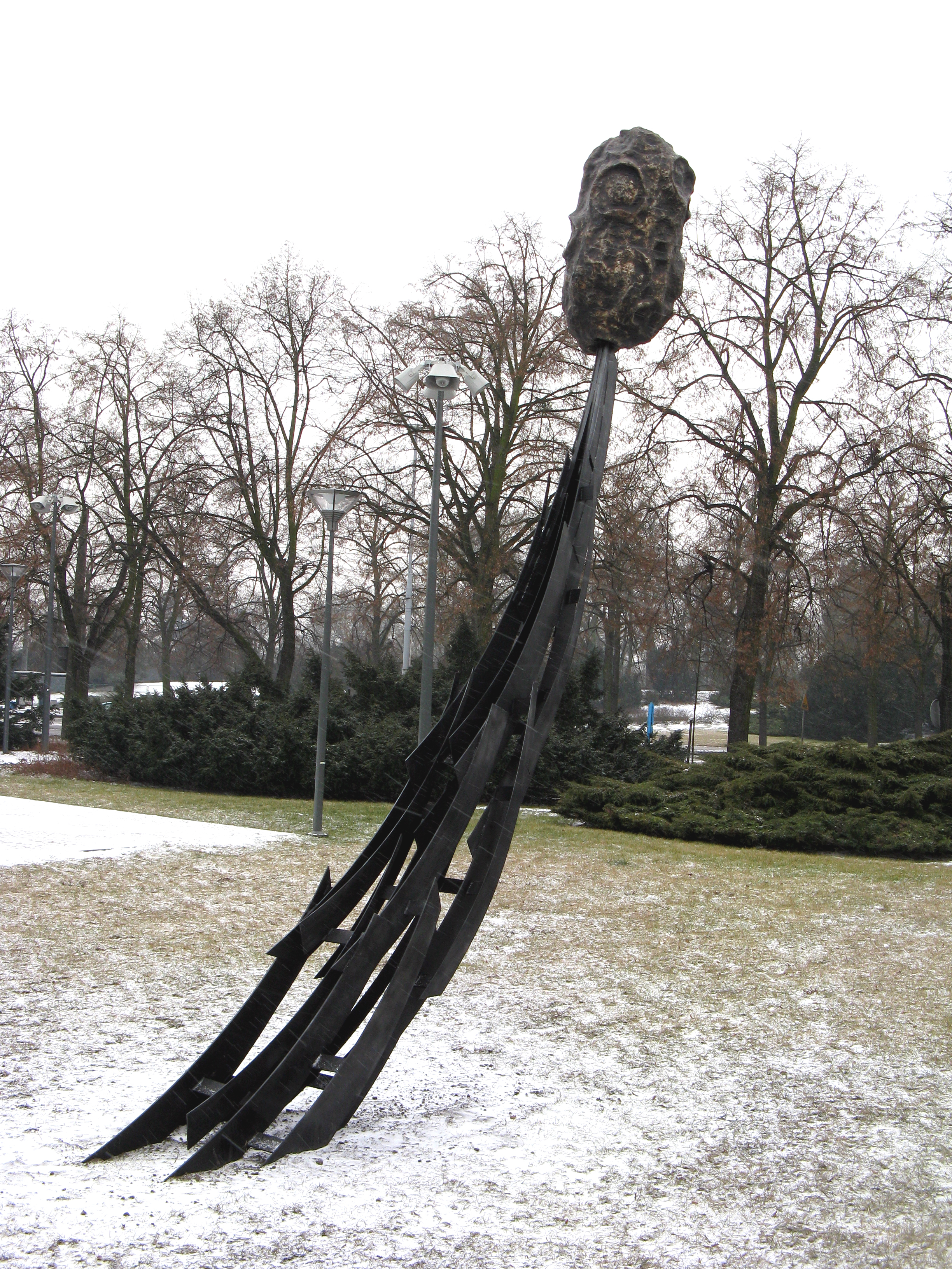 Pomnik planetoidy pl:12999 Toruń według projektu Pauliny Kaczor- Paczkowska